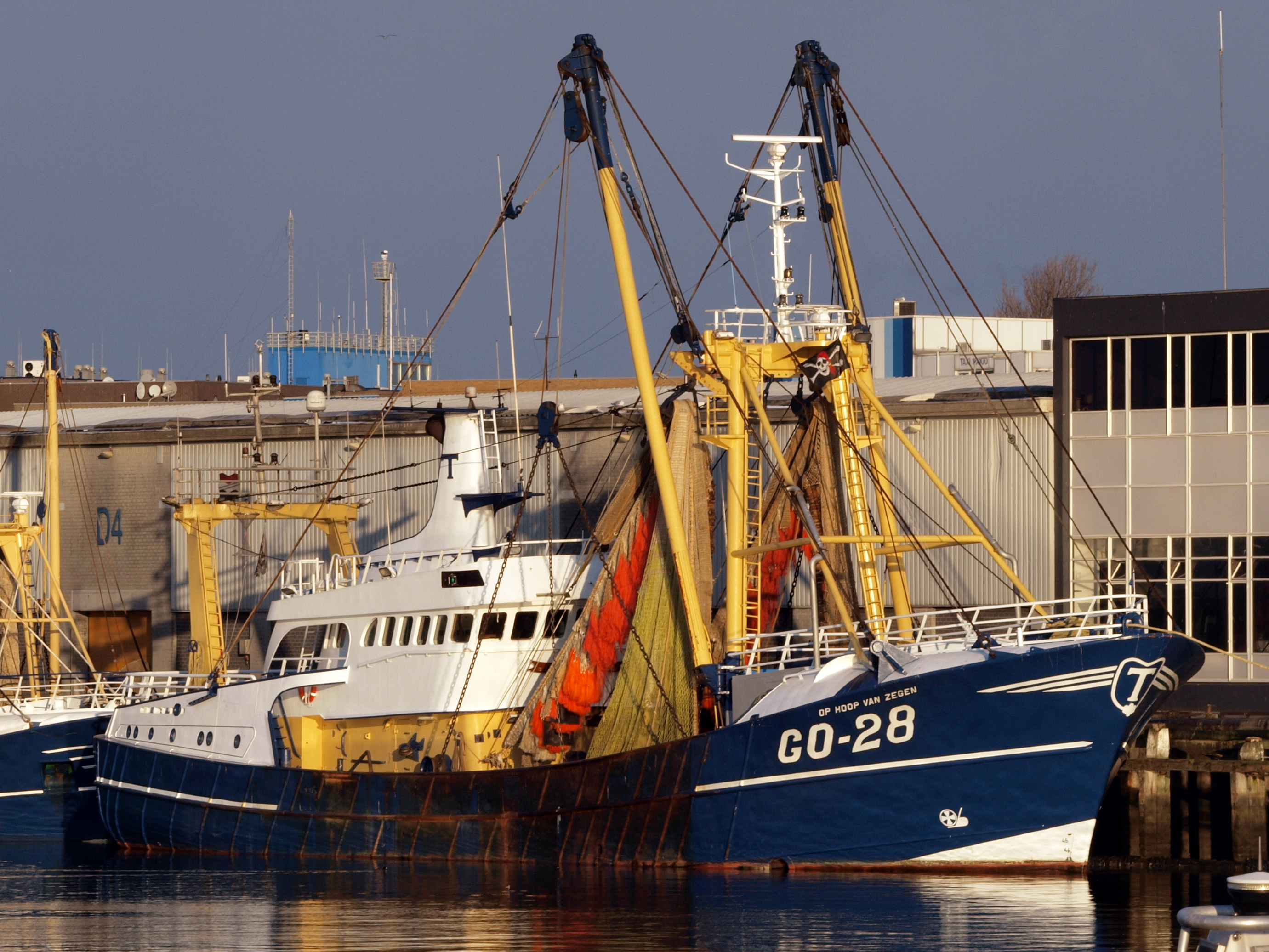 GO-28 Op Hoop van Zegen at Ijmuiden, The Netherlands.